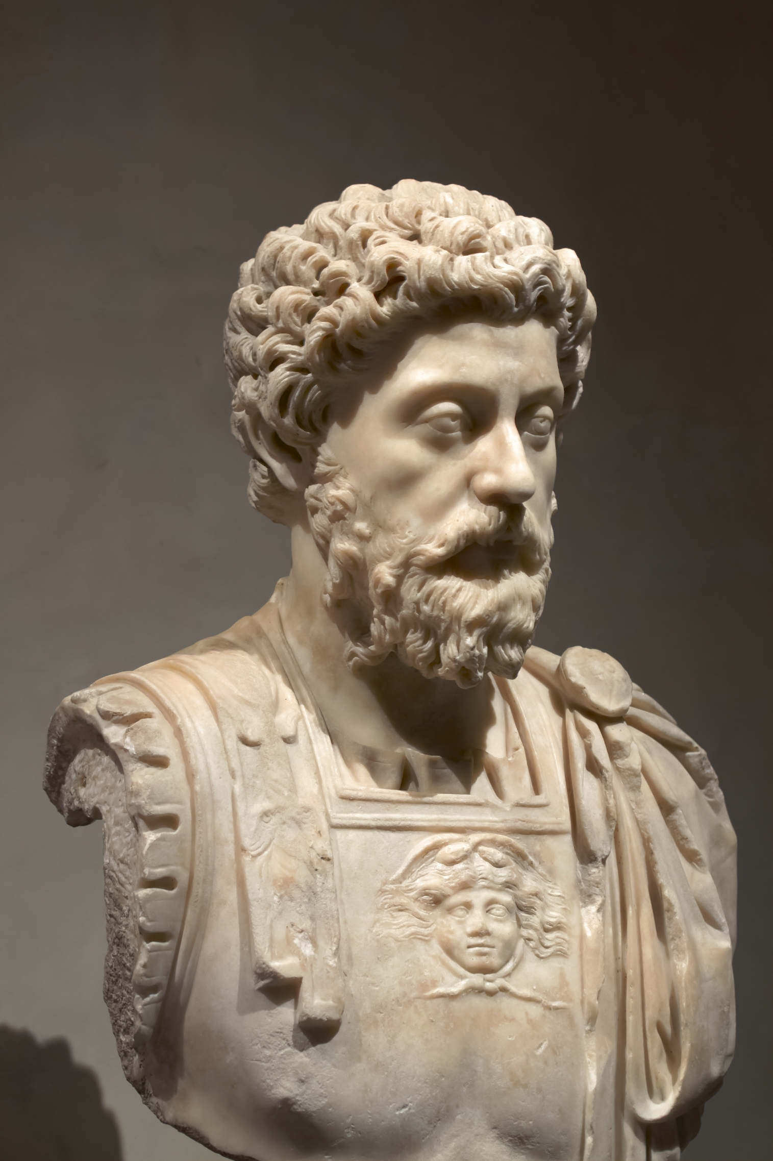 Photograph taken at: L'Image et le Pouvoir : le siècle des Antonins, Musée Saint-Raymond, 19 November 2011–18 March 2012 .